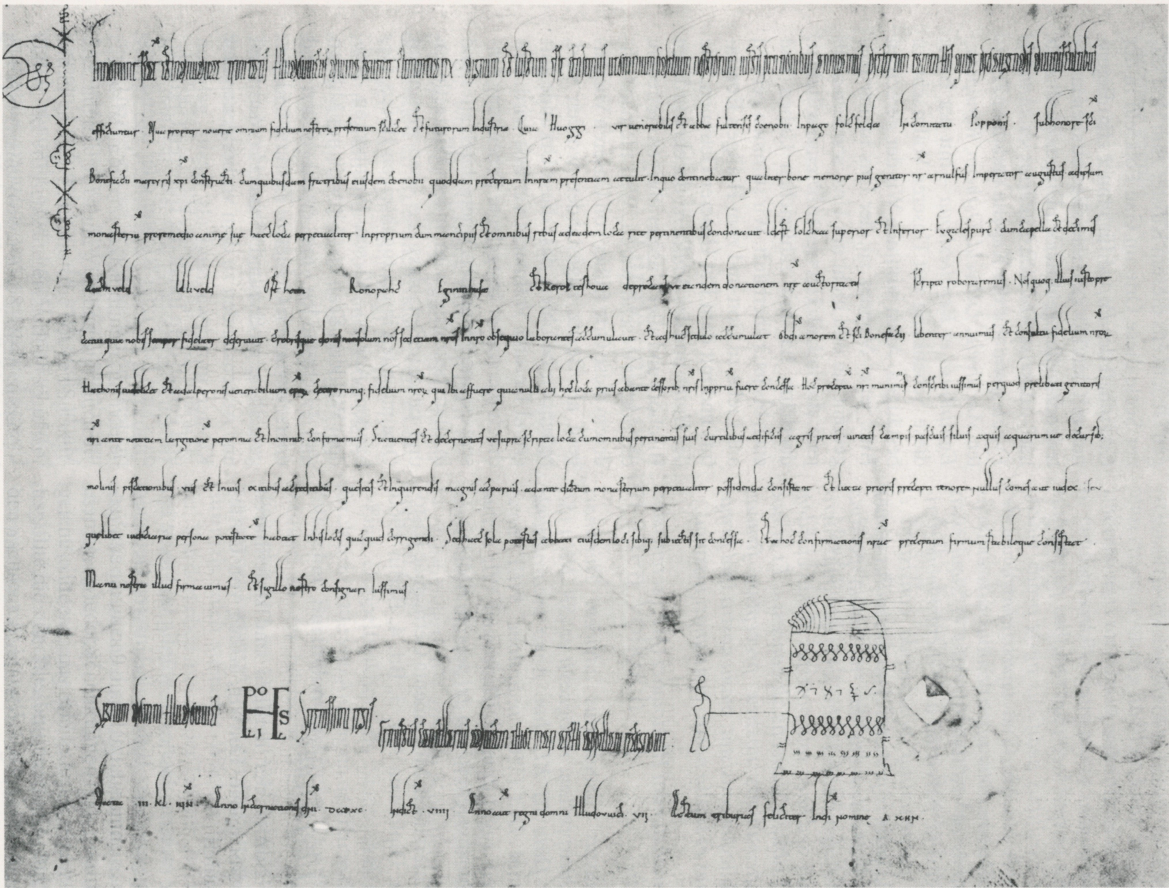 Diplom von 906. Ludwig das Kind bestätigt die Übergabe mehrerer Orte im Gau Volkfeld (Folchaa superior et inferior, Fvgalespurc cum capella et decimis, Aachiveld, Lilliveld, Ostheim, Ronopahc, Egininhusa et Kerolteshoua) an das Kloster Fulda, die sein Vater Arnulf von Kärnten im 9. Jahrhundert vorgenommen hat. Ersterwähnung vieler Orte im heutigen Norden des Landkreises Kitzingen und im Landkreis Schweinfurt.